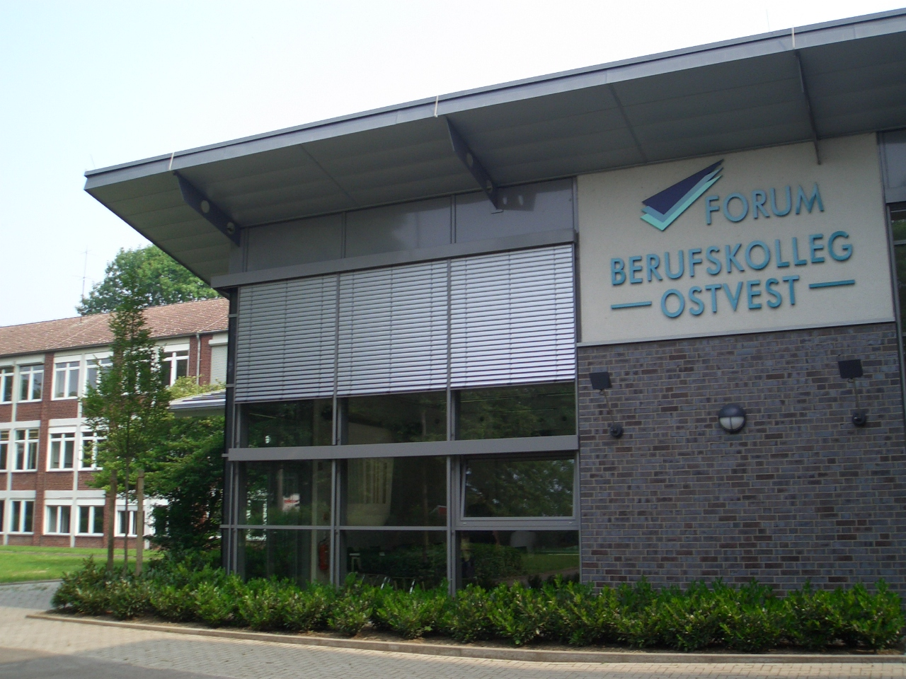 Forum des Berufskollegs Ostvest in Datteln